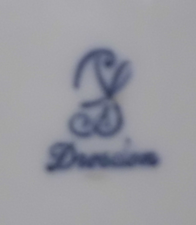 Diese Marke verwendet die Sächsische Porzellan–Manufaktur Dresden seit 1902